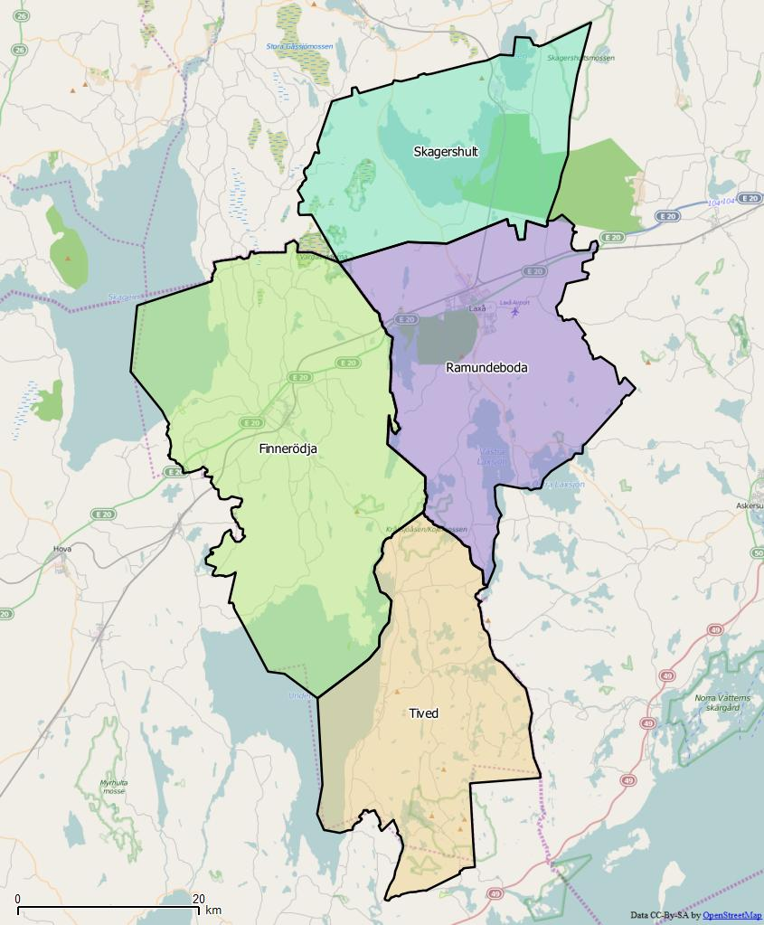 Distriktsindelningen i Kristinehamns kommun World file: 99.73347533342564475 0 0 -99.73347533342564475 1575872.09761314070783556 8210183.96208253502845764